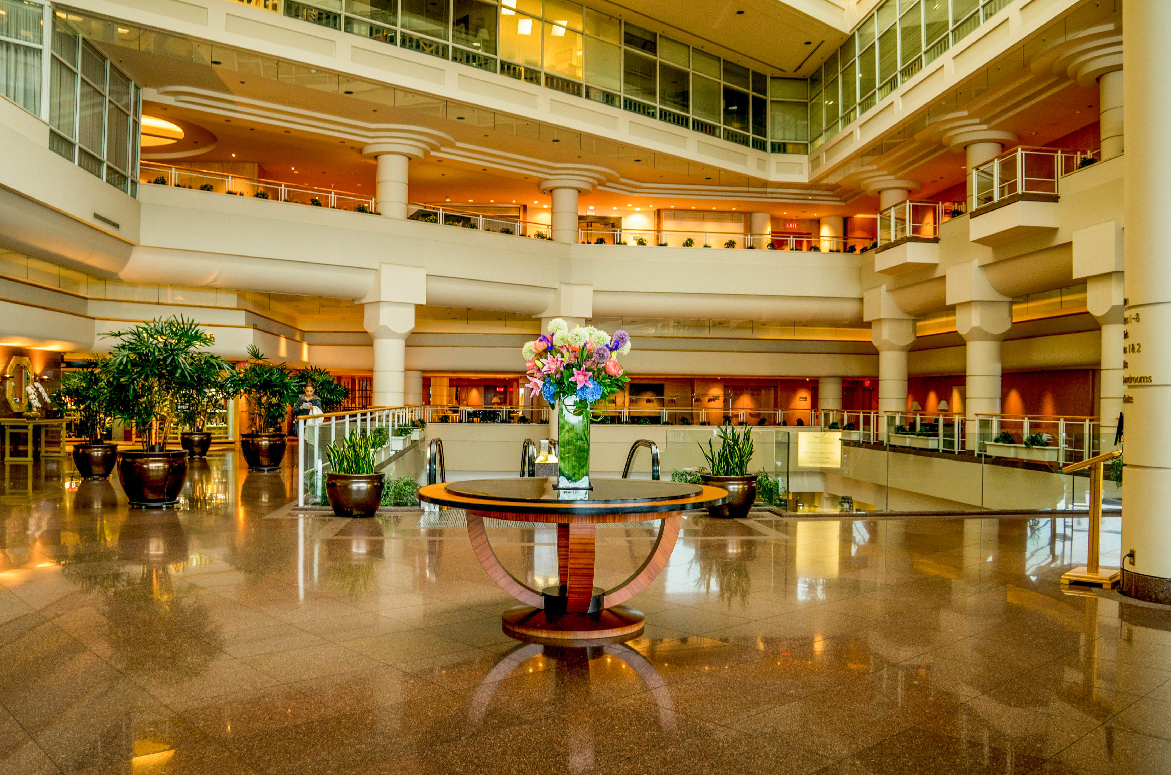 Vancouver, Canada